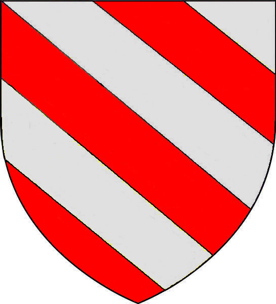 armoiries de la famille de Roisin (Tournaisis)